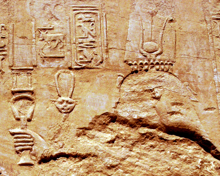 Cleopatra I. El Kab